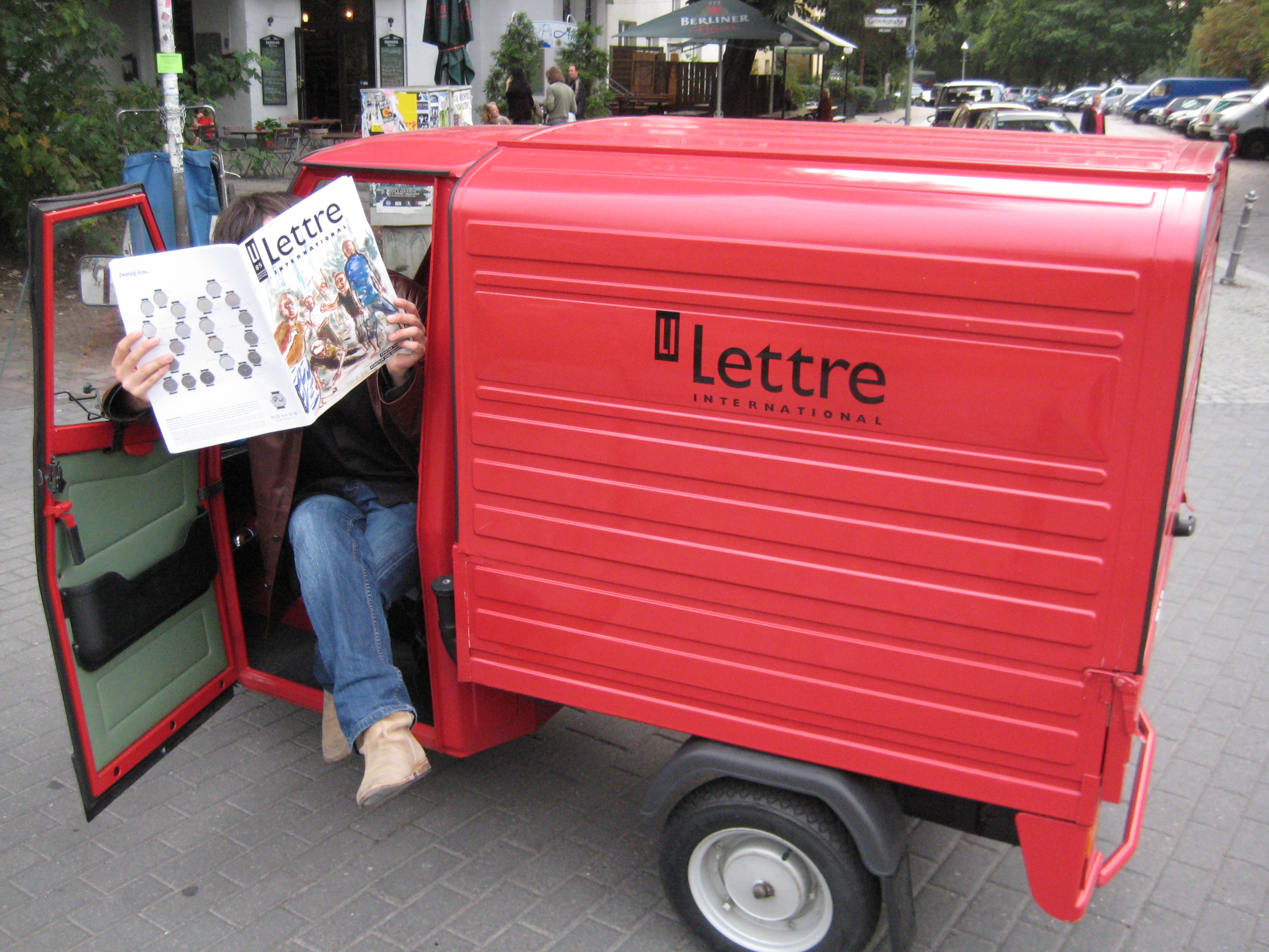 Das "Lettre-Mobil" bei einer Promotion-Kampagne für die Zeitschrift im Jahre 2009.